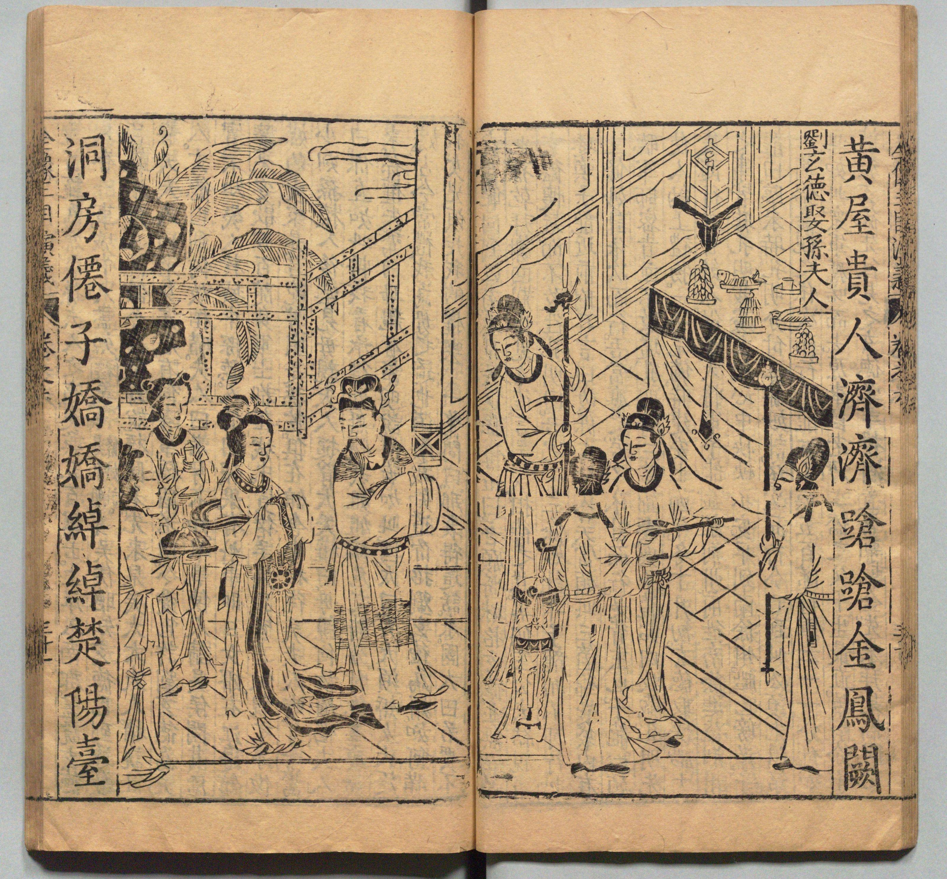 新刊校正古本大字音释三国志通俗演义 明万历十九年书林周曰校刊本